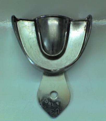 Cubeta de impresión estándar metálica superior